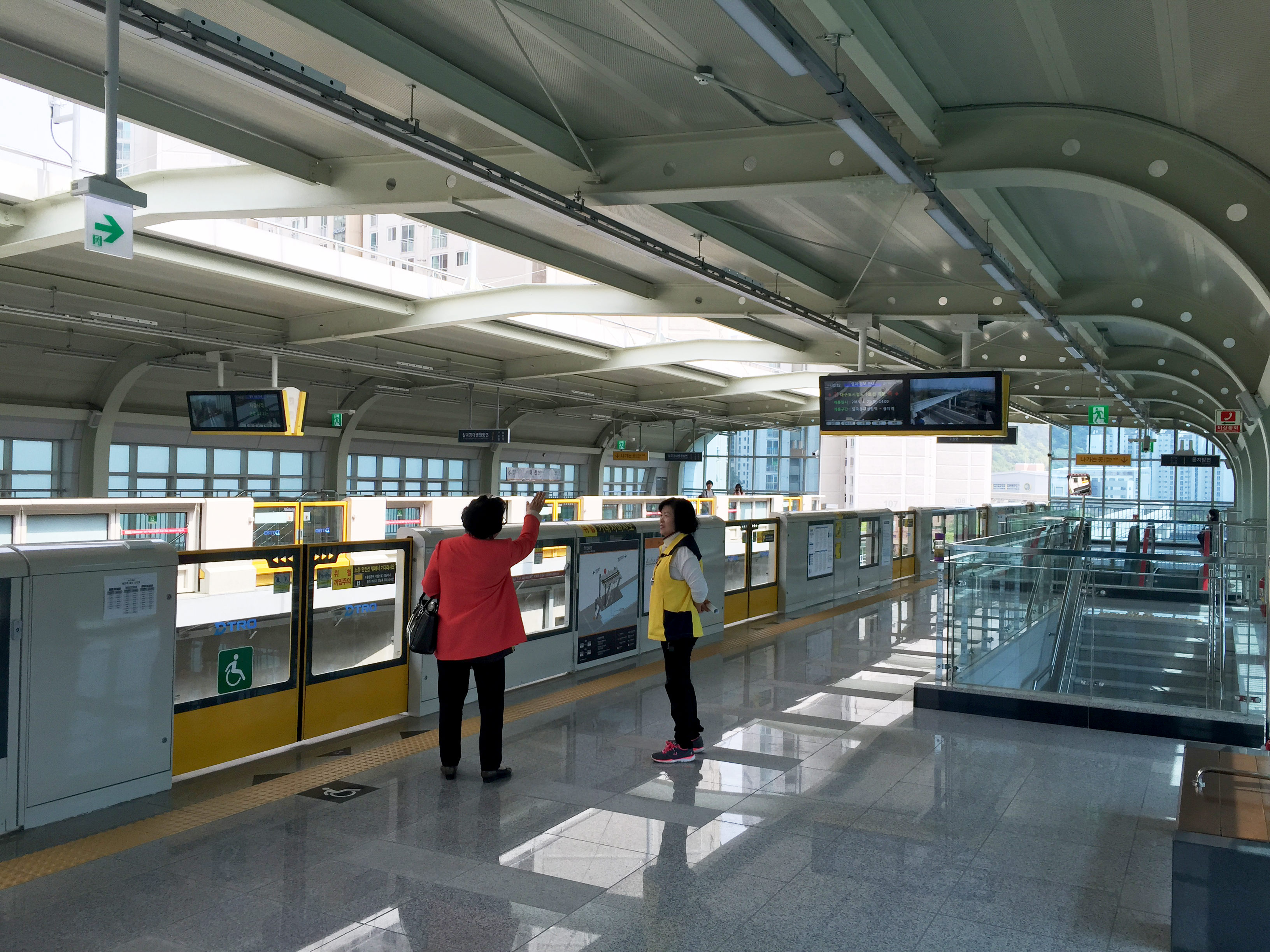 매천역 승강장